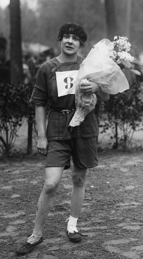 30/1/21, Mlle [Lucie] Bréard [gagnante du cross du Pélican-Club à Verrières] : [photographie de presse] / [Agence Rol]